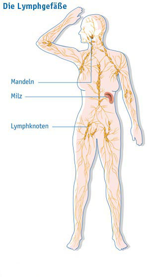 schematische Darstellung des menschlichen Lymphgefäßsystems